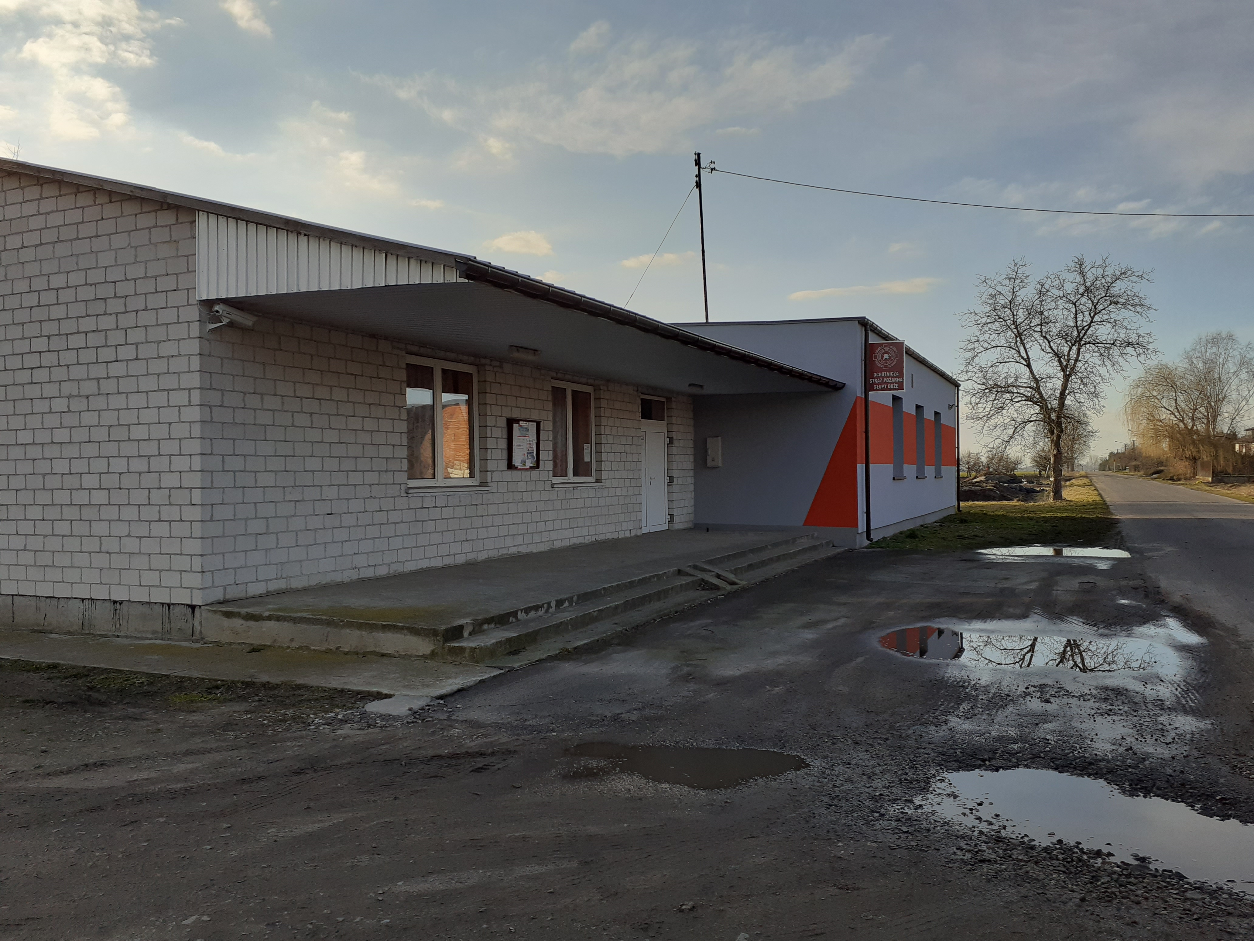 Osp